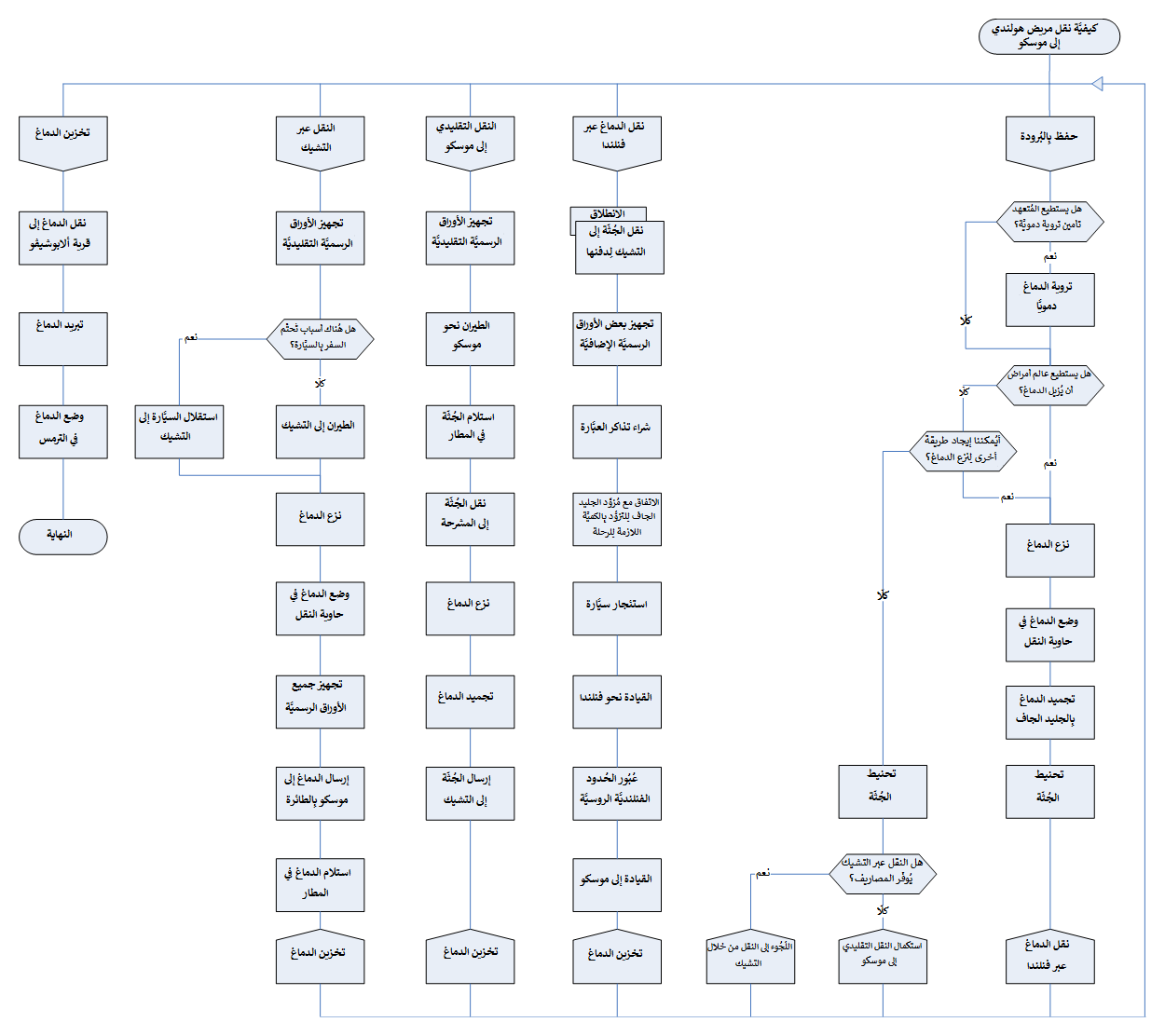 رسمٌ توضيحي يُبيِّن خُطوات نقل دماغ مُجمَّد من دولةٍ إلى أُخرى.